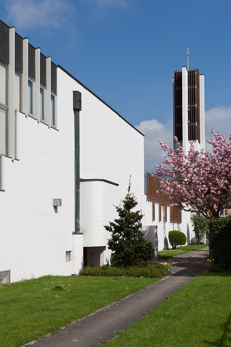 Katholische Kirche St. Christophorus in Wangen an der Aare (BE)